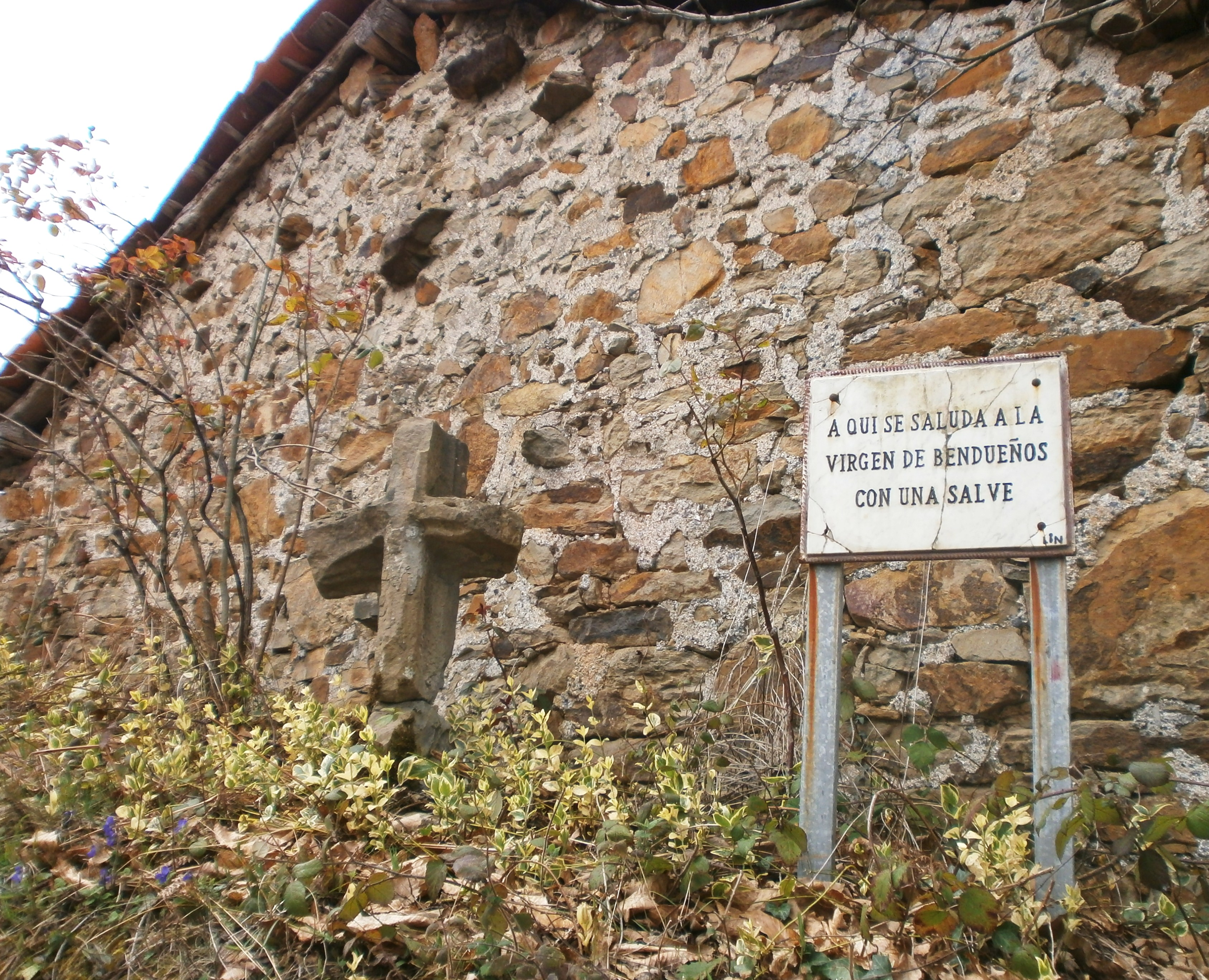 Crucero de bienvenida en el camino que lleva al Santuario